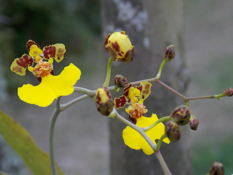 Flor de orquídea oncidium flexuosum